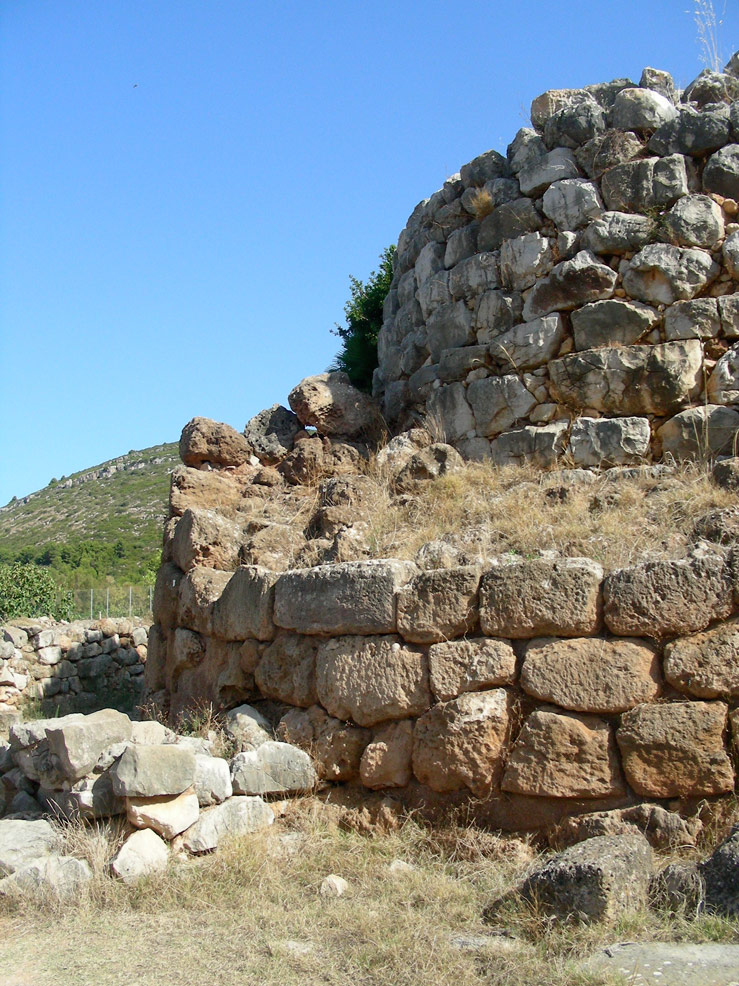 Italia, Sardegna, provincia di Sassari, Alghero, nuraghe e villaggio nuragico di Palmavera, torre A (torre più antica), in calcare e muro di collegamento alla torre B (più recente), in arenaria